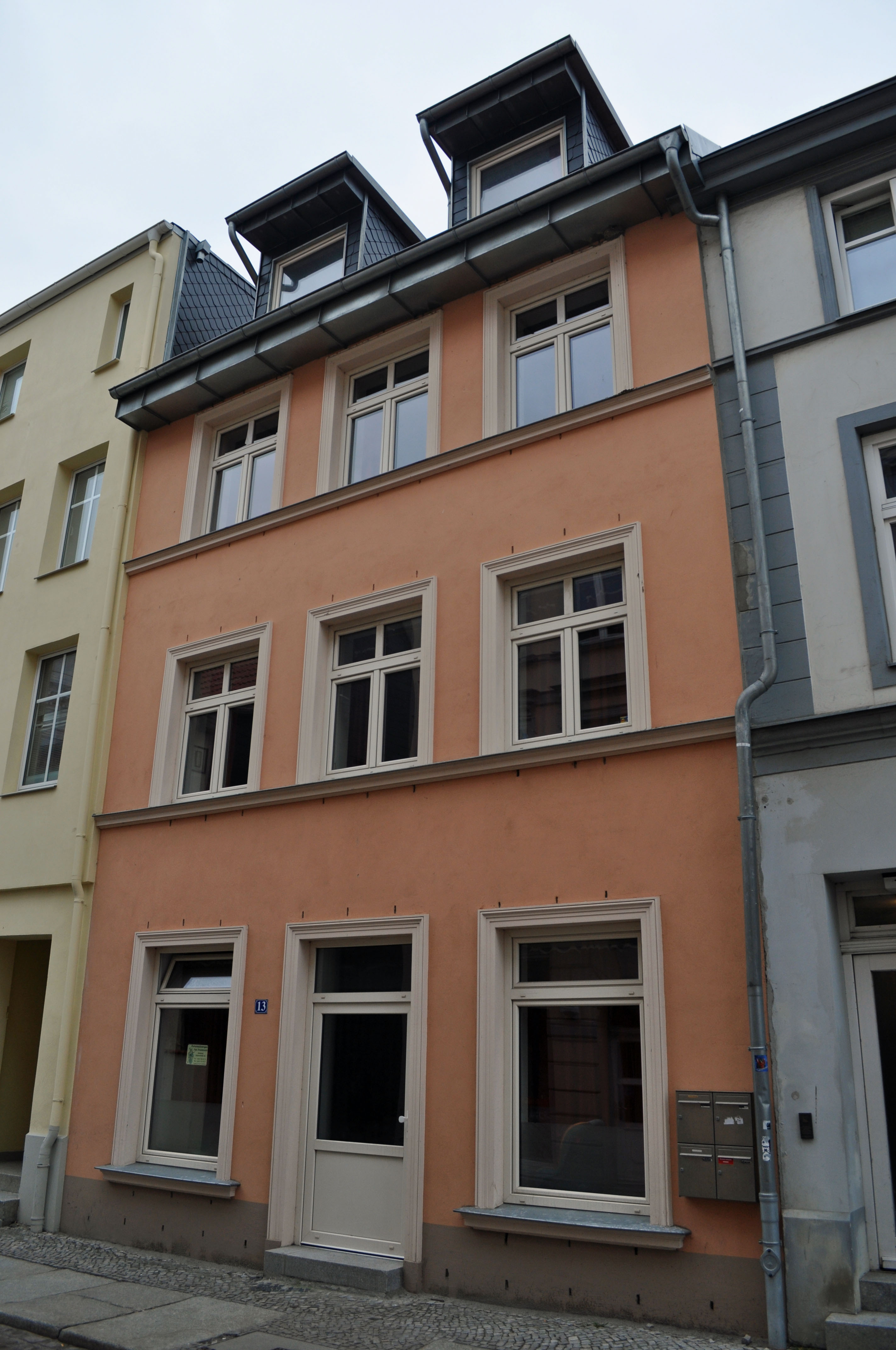 Gebäude bzw. Gebäudedetail in Stralsund. Straße und Hausnummer siehe Dateiname.